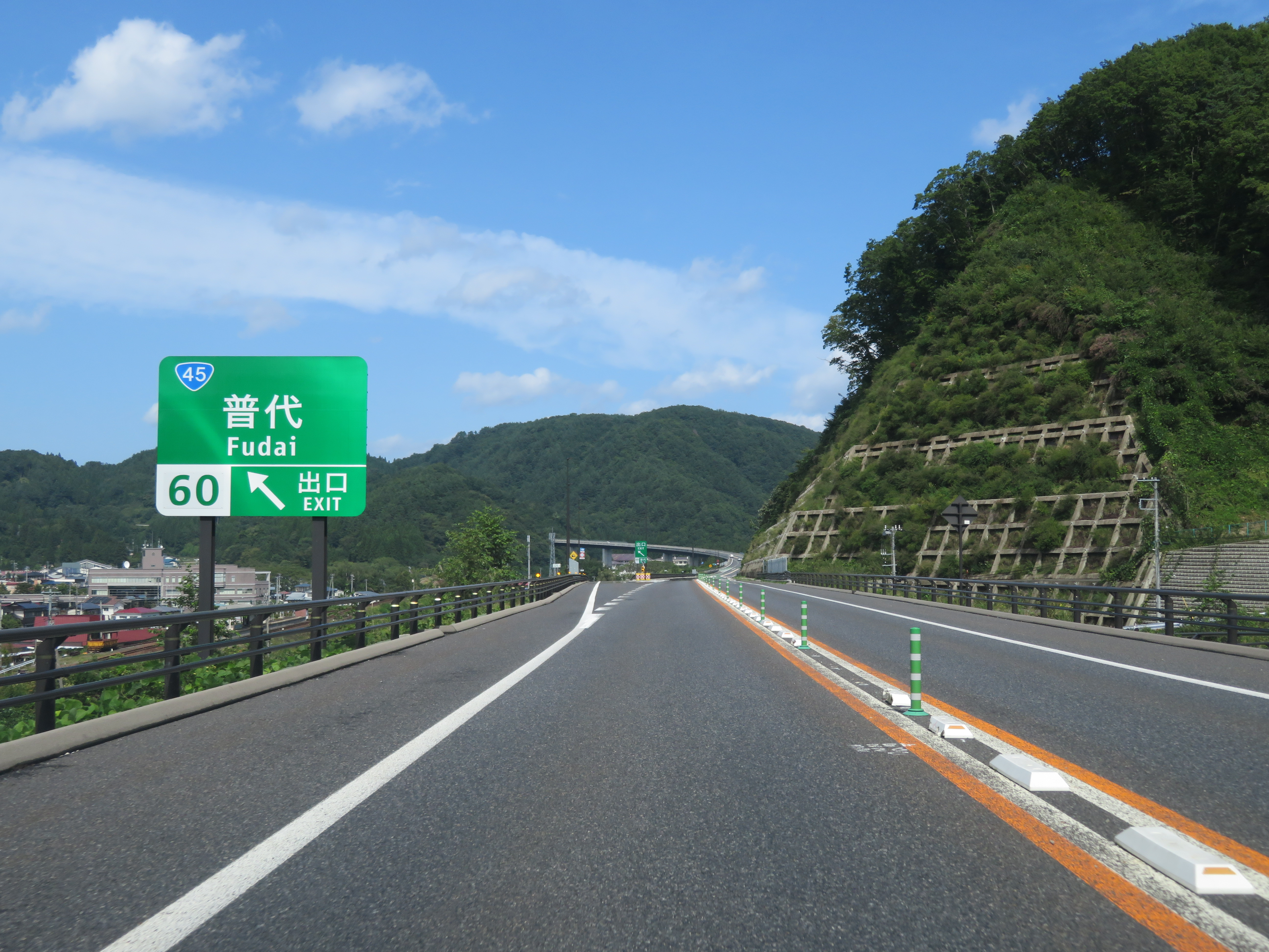 三陸北縦貫道路普代インターチェンジ出口付近（宮古方面側から撮影） Canon PowerShot SX720 HS